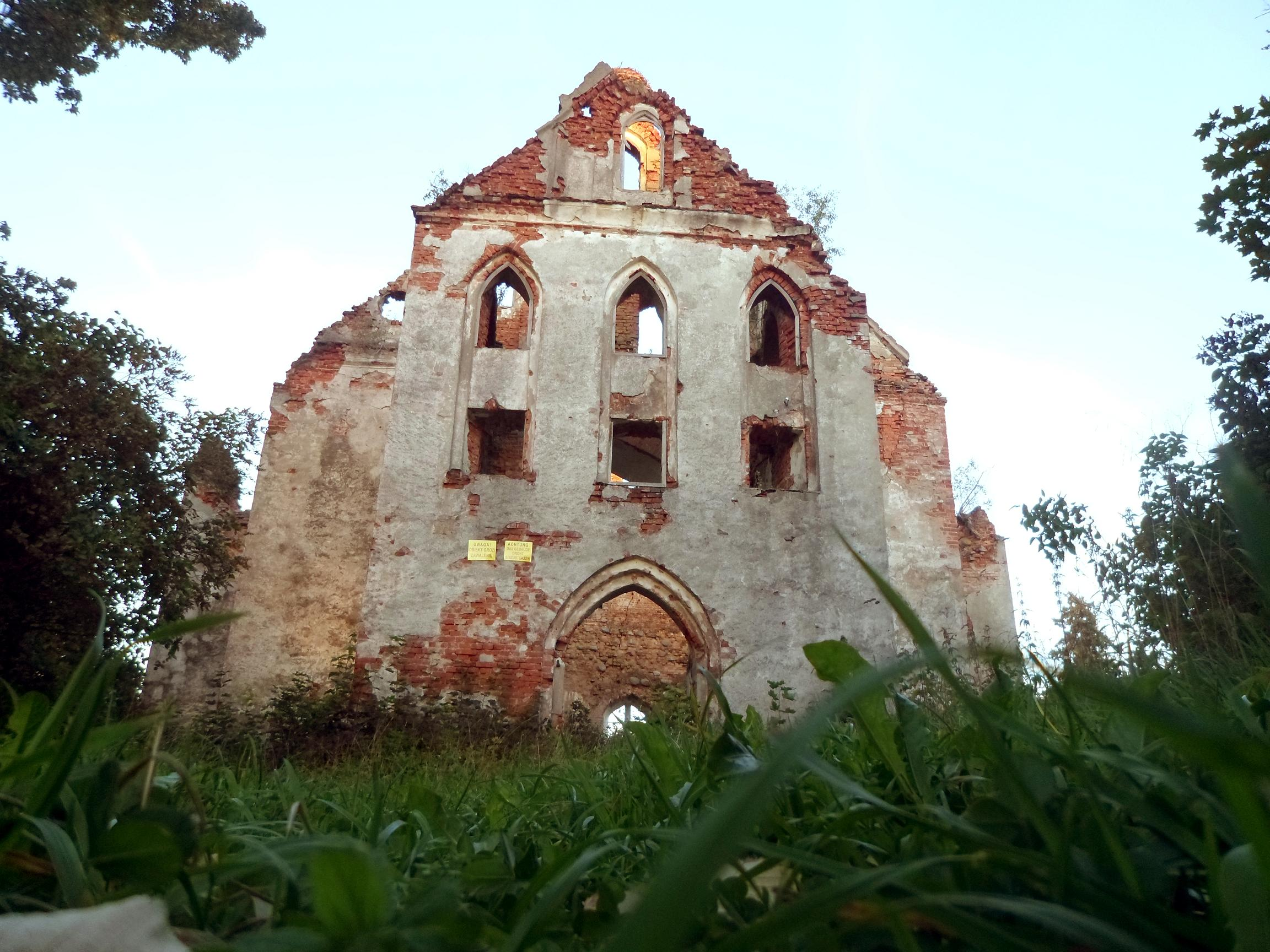 Górne, ruiny kościoła ewangelickiego, 1 poł. XVII